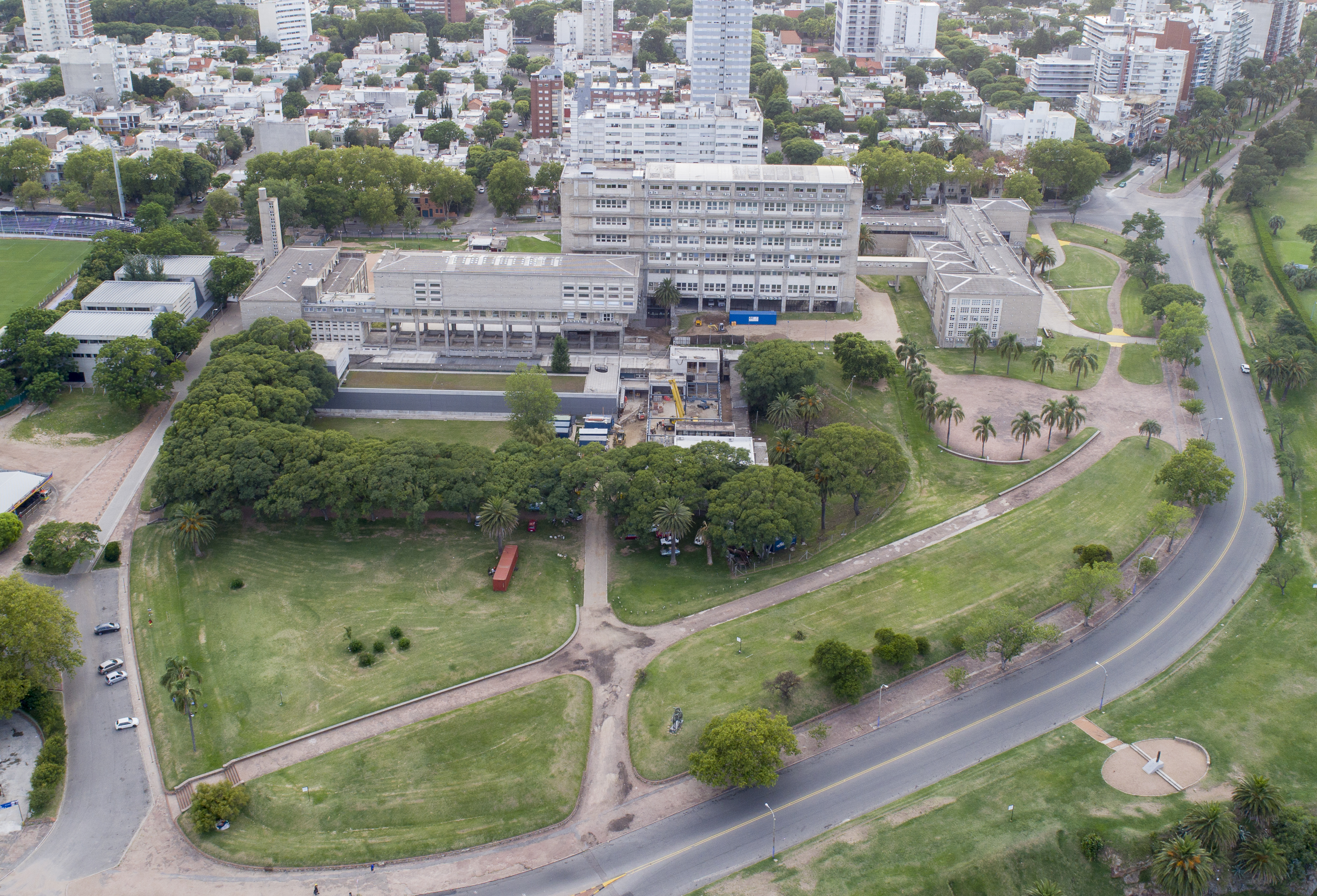 Facultad de Ingeniería de la UDELAR, Montevideo, Uruguay